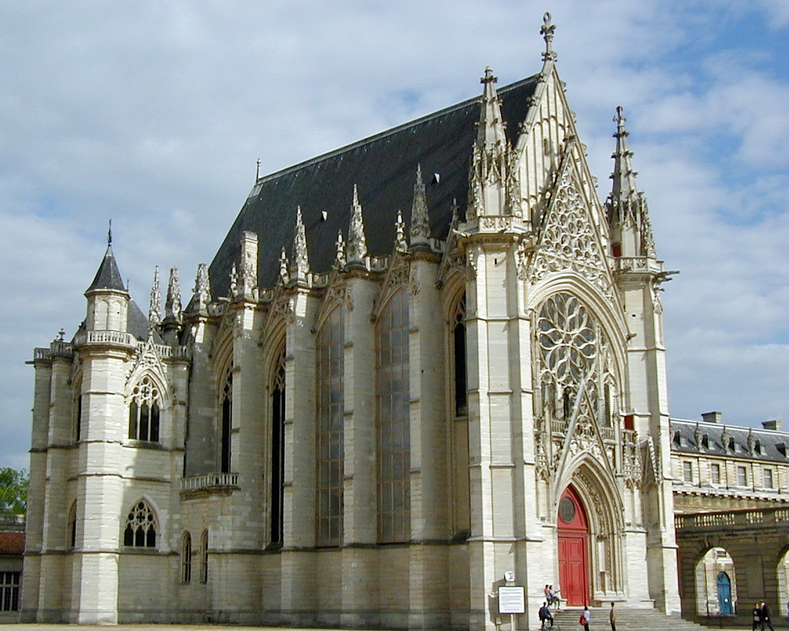 Château de Vincennes - Sainte-Chapelle - Ensemble